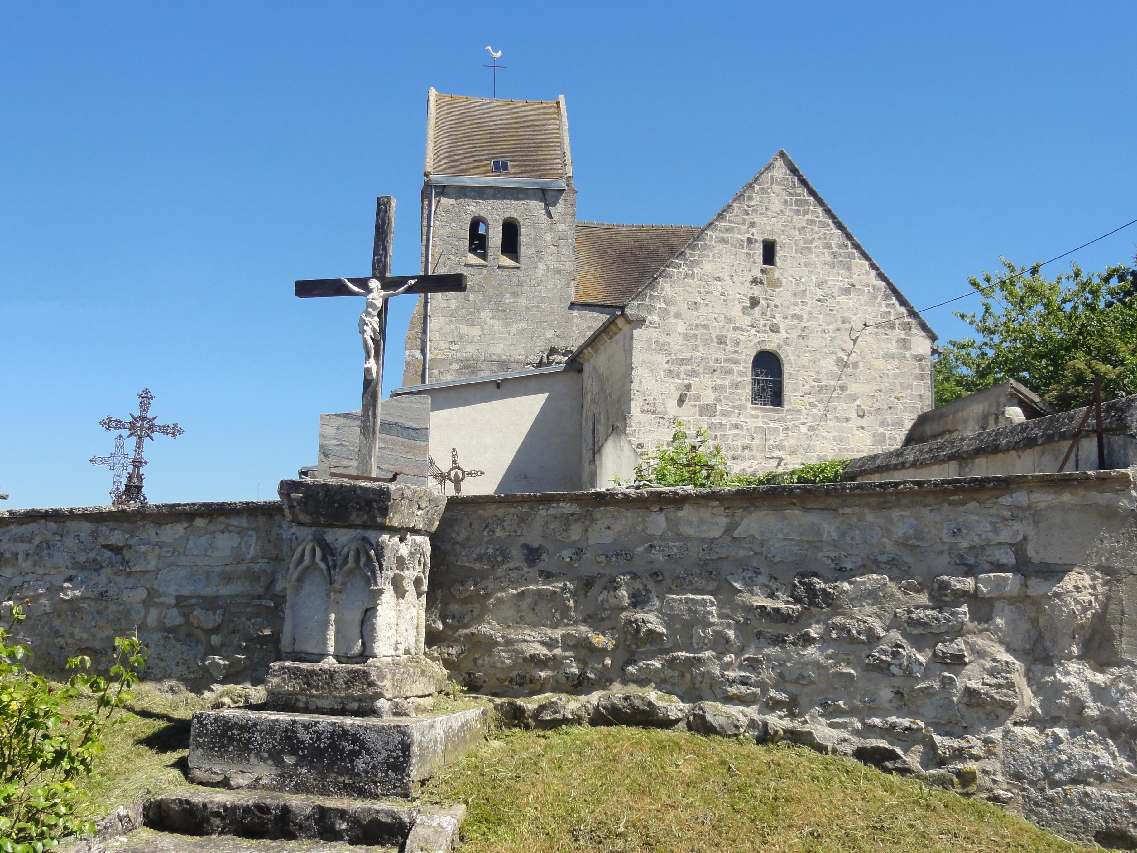 Calvaire devant l'église.